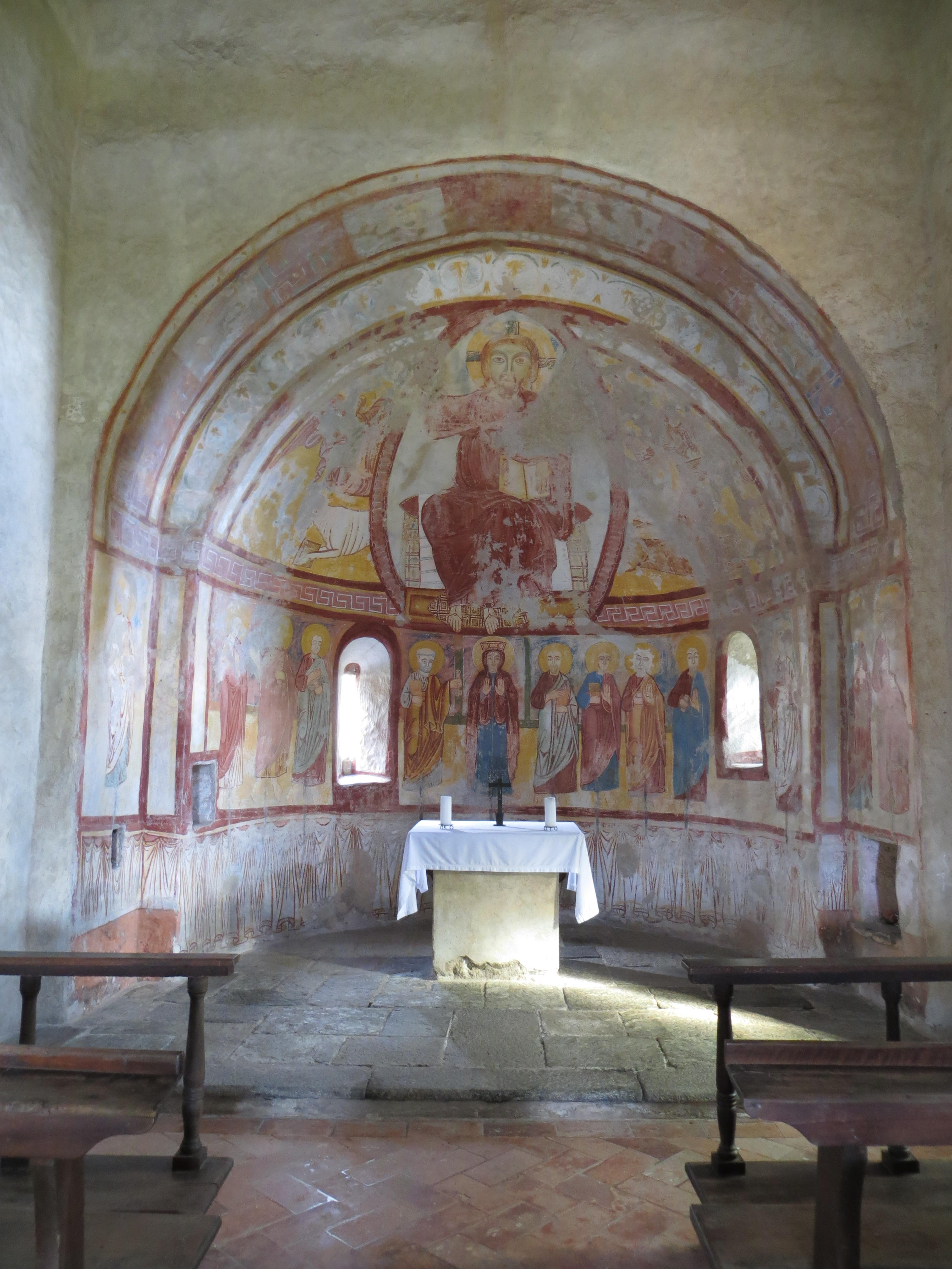 Apside